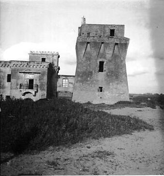 Lago Patria (prov. Caserta) - Torre di Patria. Autore sconosciuto.